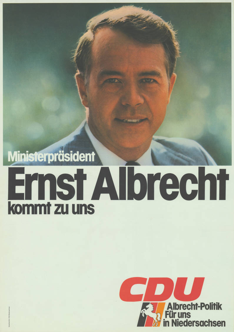 Ministerpräsident Ernst Albrecht kommt zu uns CDU Albrecht-Politik Für uns in Niedersachsen Abbildung: Porträtfoto - Nationalfarben mit Niedersachsenross Plakatart: Blanko-Motiv-/Ankündigungsplakat Auftraggeber: Verantw.: CDU Niedersachsen Objekt-Signatur: 10-008 : 401 Bestand: Landtagswahlplakate Niedersachsen (10-008) GliederungBestand10-18: Landtagswahlplakate Niedersachsen (10-008) » CDU Lizenz: KAS/ACDP 10-008 : 401 CC-BY-SA 3.0 DE